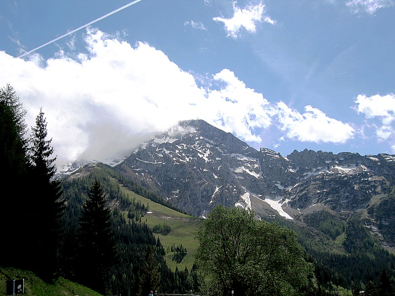 Rossfeldstrasse - Berchtesgaden - Bavaria - Germany